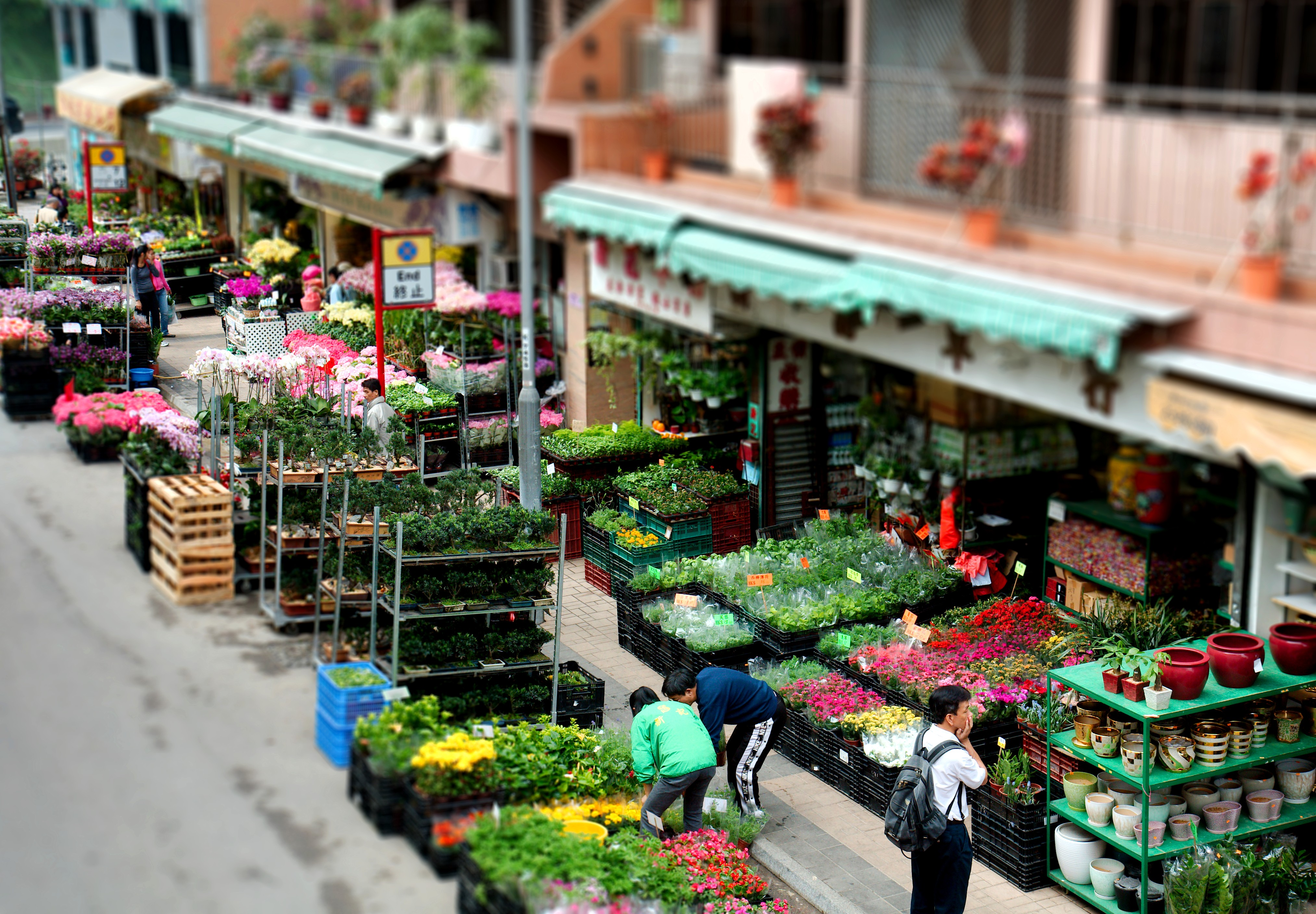 Flower Market Yuen Po Street